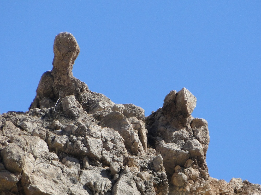 قسمتی از دیوار ویران شده قلعه دارالامان